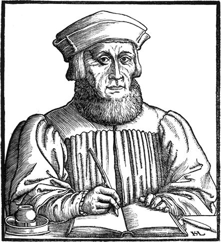 Hans Sebald Lautensack: Bildnis des Johann Aventinus, Druck, Nürnberg, Germanisches Nationalmuseum, Graphische Sammlung, H 462a (Annales Boiorum libri septem, 1554)